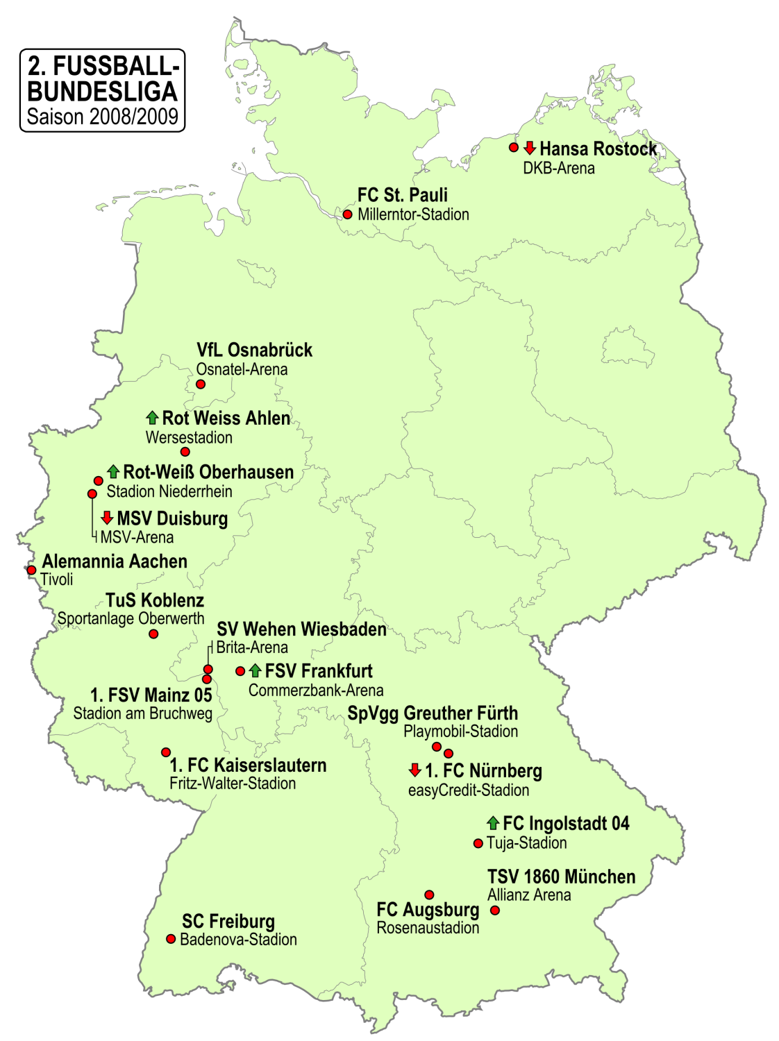 Karte der Vereine der 2. Fußball-Bundesliga-Saison 2008/2009